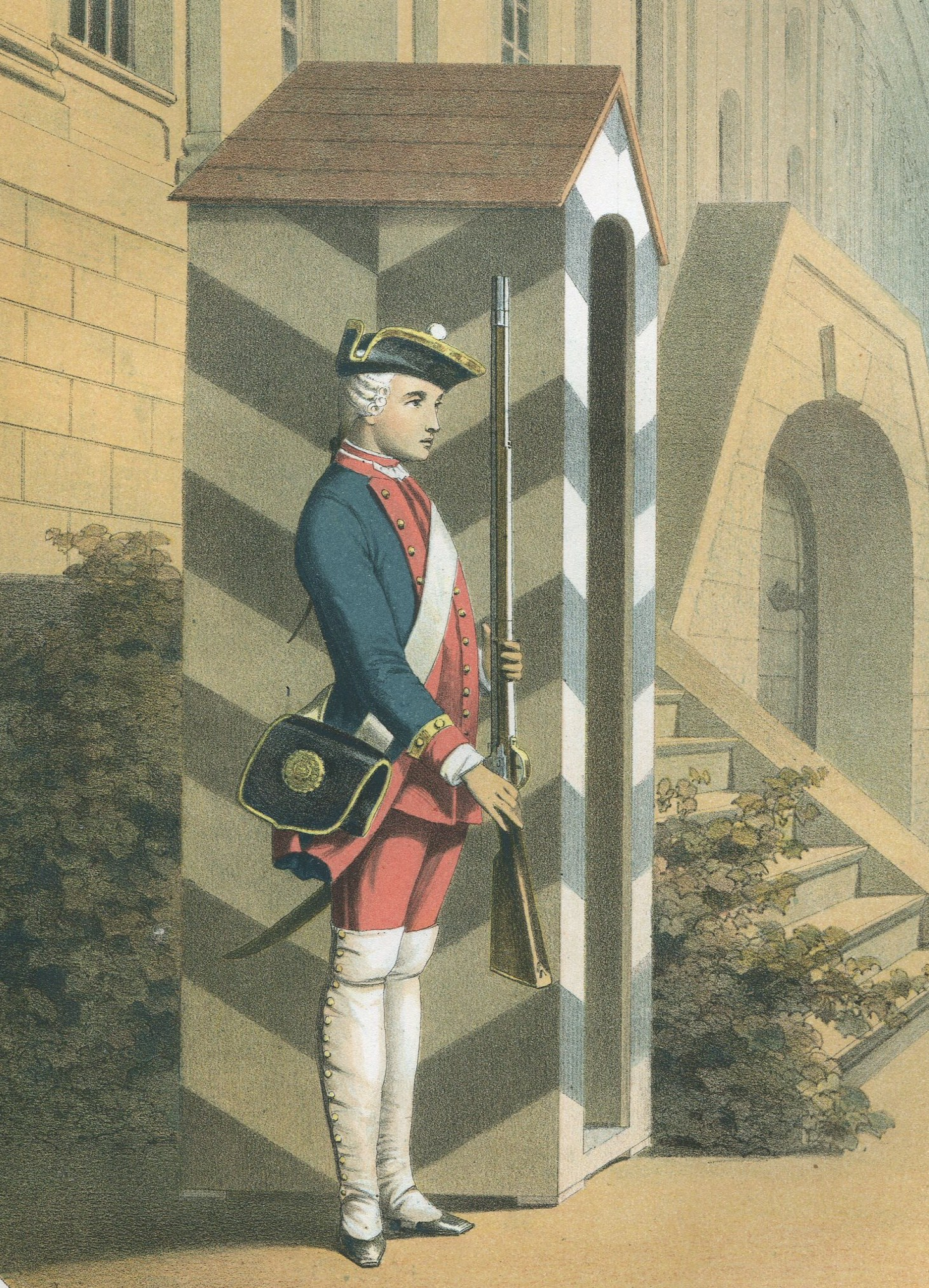 Kadett vor Wachhäuschen 1717 in Berlin